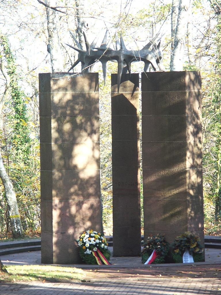 War Memorial - Krieger-/Kriegsopferdenkmal - Mémorial de guerre